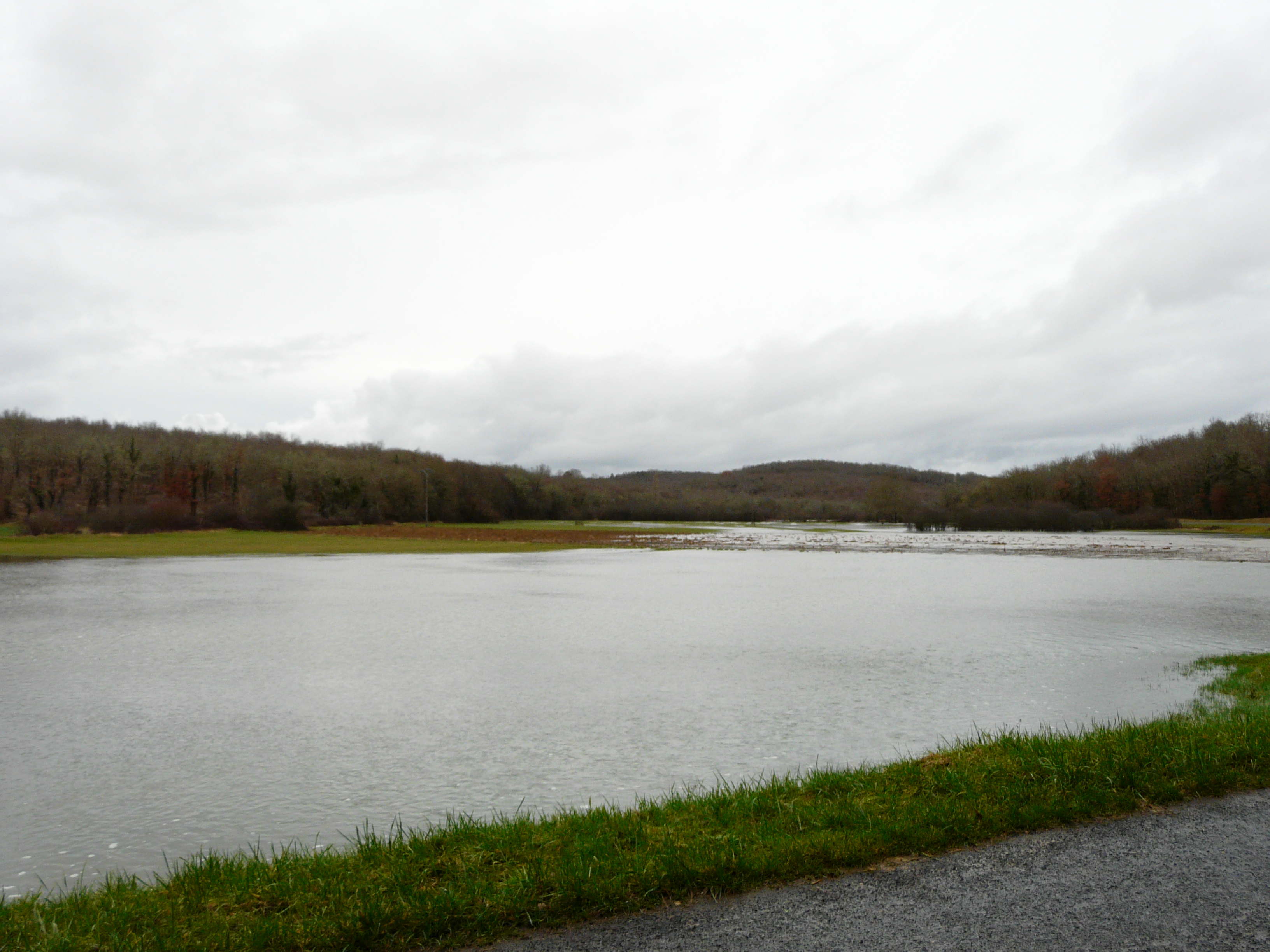 La vallée de la Soue le long de la route départementale 70 lors d'une crue, commune de Brouchaud, Dordogne, France. Vue prise en direction de l'amont.